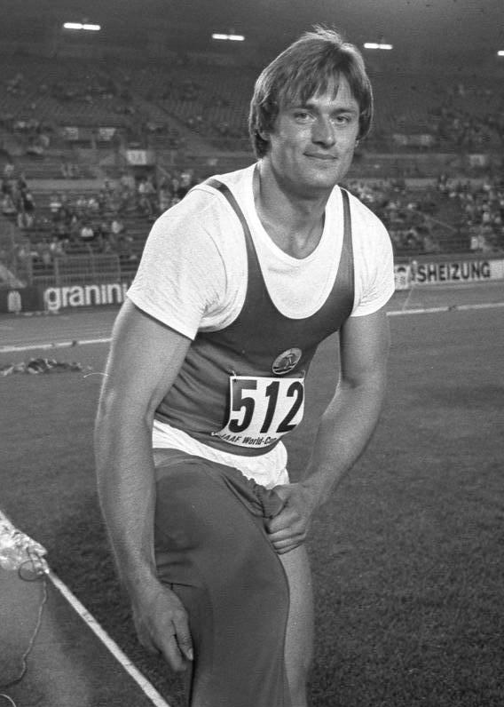 IAAF-Worldcup, Wolfgang Schmidt im Wettkampf ADN-ZB/Mittelstädt/1.6.78 [Herausgabedatum] Berlin: Europarekord durch Wolfgang Schmidt. Schon zu einem frühen Termin am Saisonbeginn lassen die DDR-Leichtathleten aufhorchen. Nach dem 200-m-Weltrekord und den DDR-Rekorden vom 28.5. sorgte Wolfgang Schmidt (SC Dynamo) bei einem Abendsportfest am 31.5. für eine weitere Bestmarke. Er schleuderte den Diskus auf 68,92m und verbesserte damit seinen Europarekord um 32cm. (Foto von einem früheren Wettkampf) Abgebildete Personen: Schmidt, Wolfgang: Leichtathlet, Diskuswerfer, Olympiateilnehmer 1976, DDR